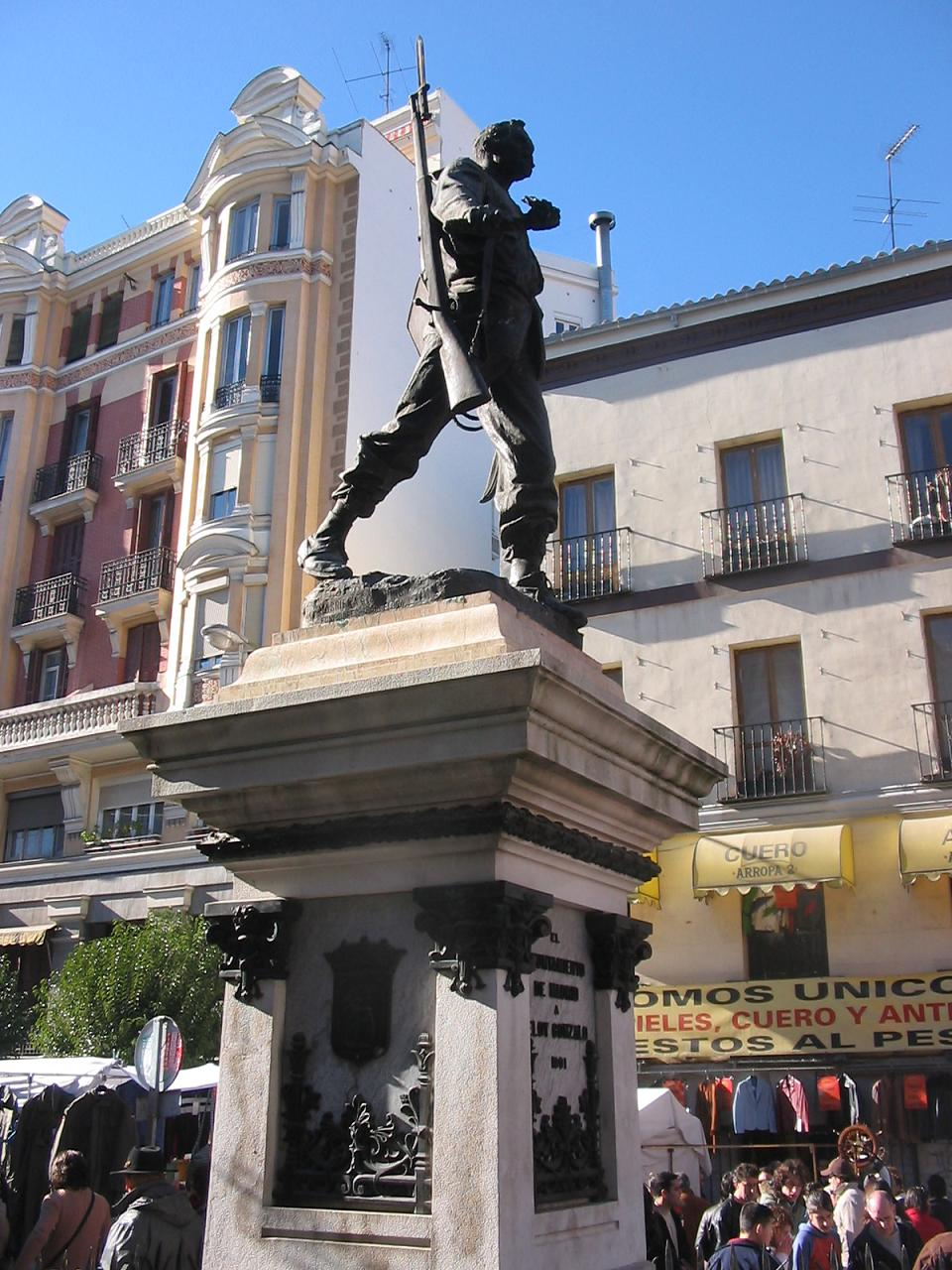 Esta estatua se encuentra en la plaza de Cascorro de Madrid, es el héroe de la guerra con cuba Eloy Gonzalo, soldado madrileño, quien llevó a cabo en el año 1896 la arriesgada hazaña de ir él solo, con una lata de petróleo, a prender fuego al paraje donde estaban unos defensores de la independencia cubana. Las fotos están realizadas en Domingo, día de rastro en Madrid.